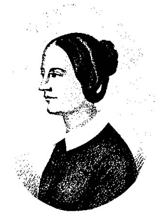 Gravure d'Eugénie de Guérin (XIXe siècle).